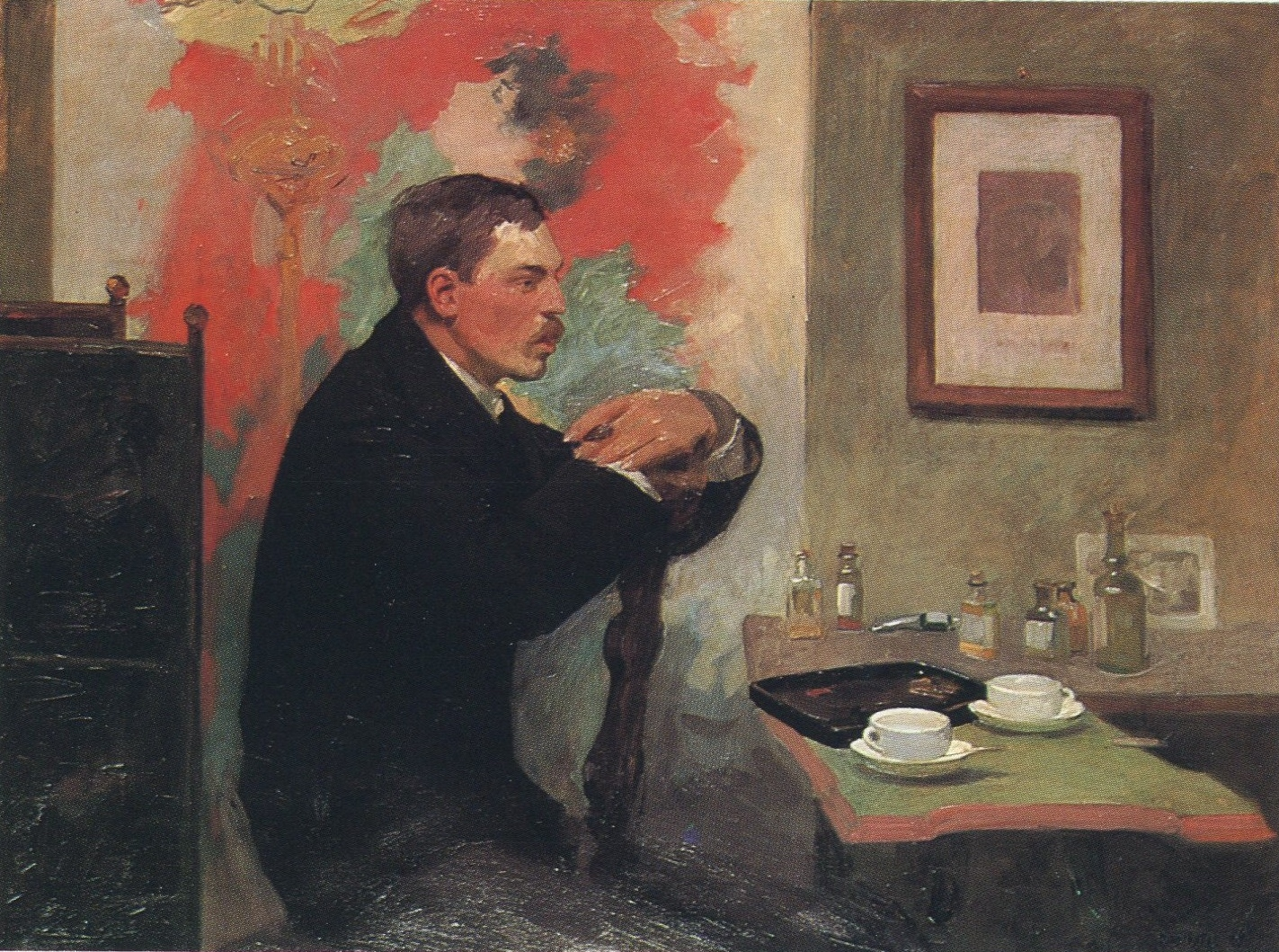 Porträt des Malers Julius Wohlers in seinem Atelier von Alfred Mohrbutter gestorben 1908